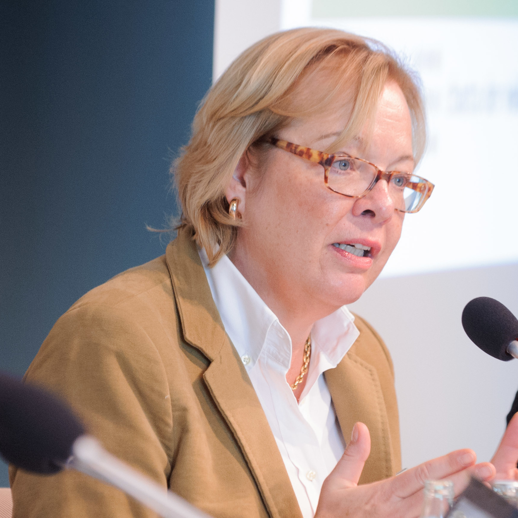 Aletta Gräfin von Hardenberg (Charta der Vielfalt), Martin Zierold (BVV Fraktion Berlin-Mitte, Bündnis 90/Die Grünen) bei der Fachtagung "Hochinklusiv! Zusammenhalt einer vielfältigen Gesellschaft" der Heinrich-Böll-Stiftung in Berlin / Germany